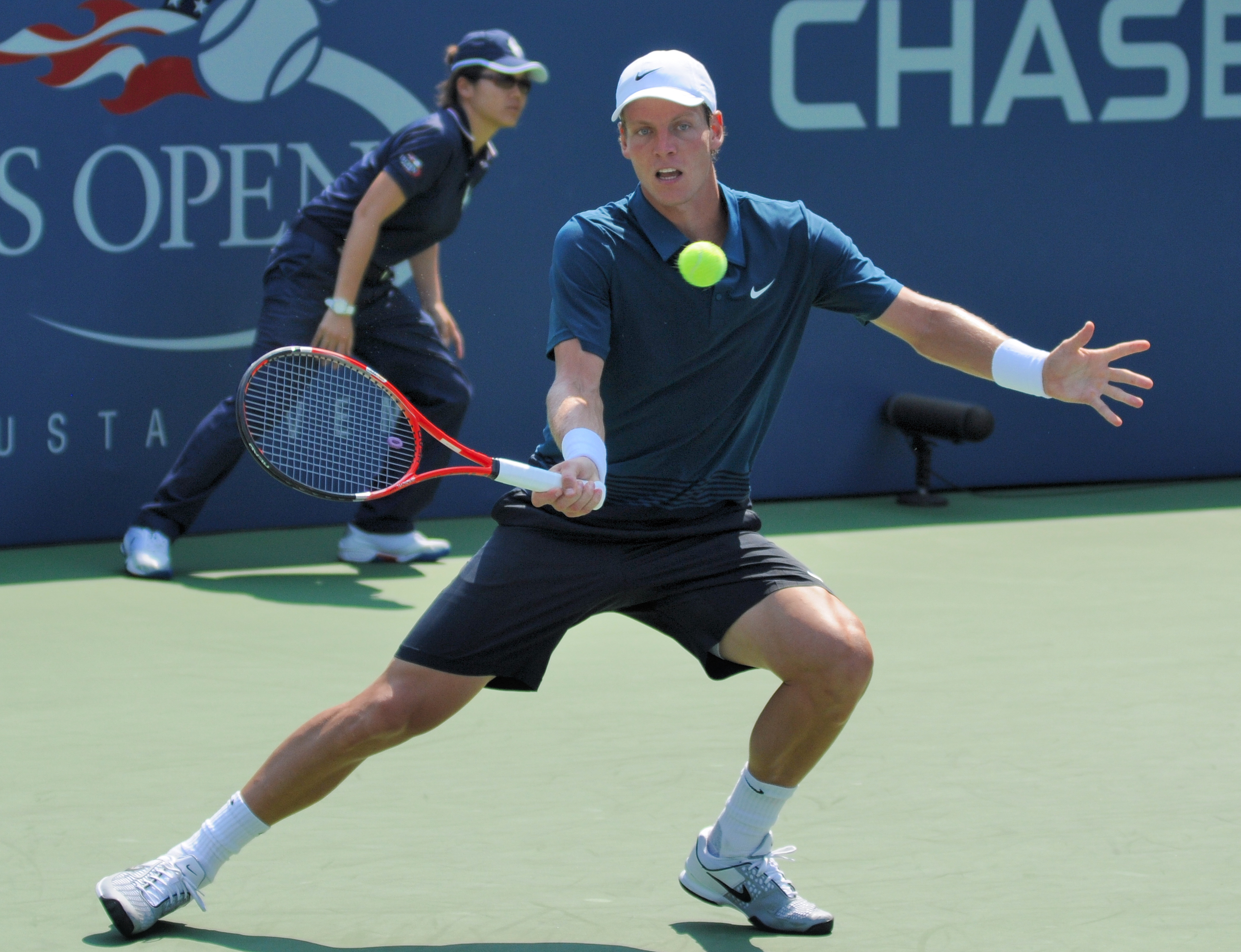 Tomas Berdych - US Open 2010